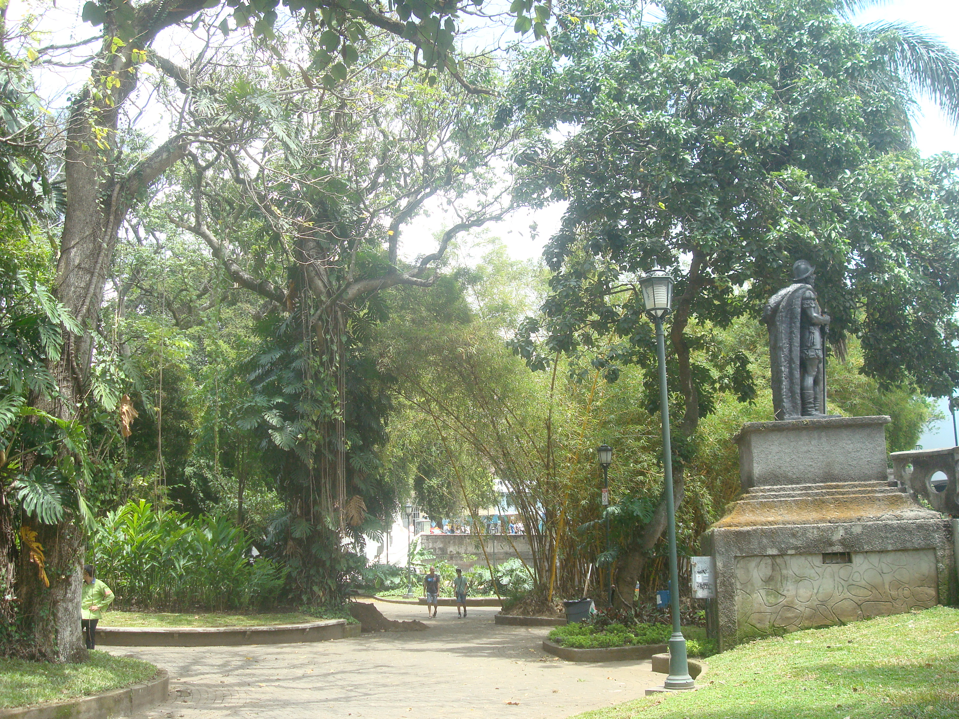 Parque España en San José de Costa Rica. Se aprecia la estatua de Juan Vázquez de Coronado, conquistador español.